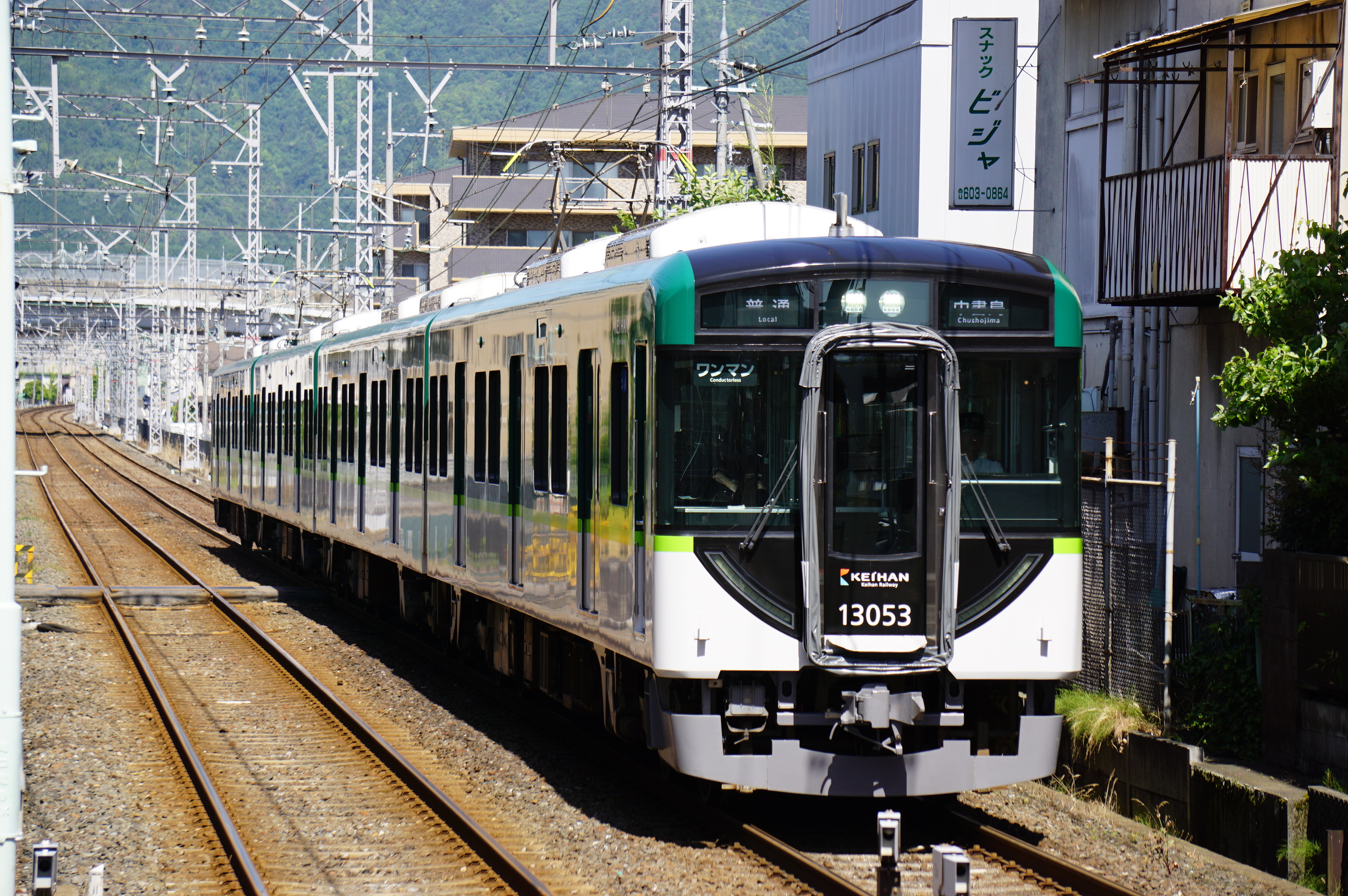 8両運転に備えて前面に幌を付けた13053号車